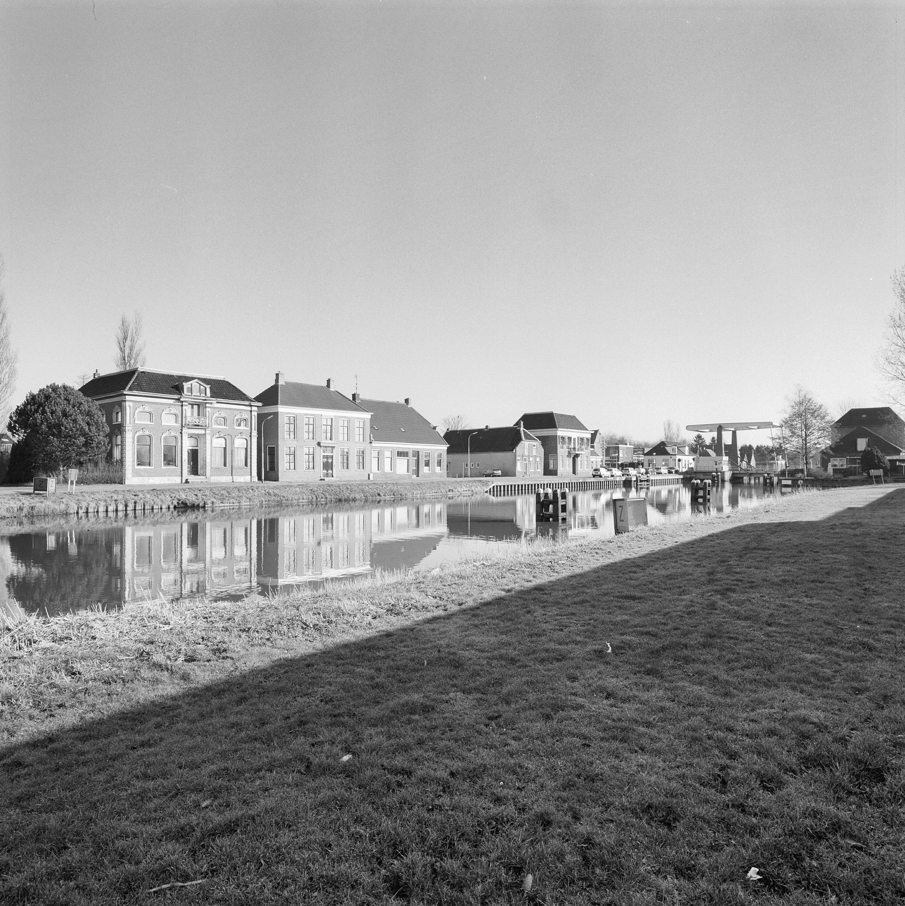 Overzicht vanaf de overkant van het water op Winschoterdiep 12, 9 en 7